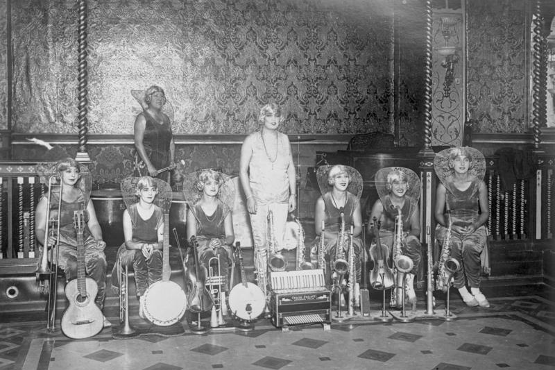 Eine Damen-Jazzbandkapelle besucht Deutschland! Die bekannte italienische Damen-Jazzbandkapelle "Delores", welche zurzeit in Mailand gastiert, will demnächst eine Tourneé durch Deutschland unternehmen. Jedes Mitglied der Kapelle ist eine Meisterin in ihrem Fach. Information added by Wikimedia users.*